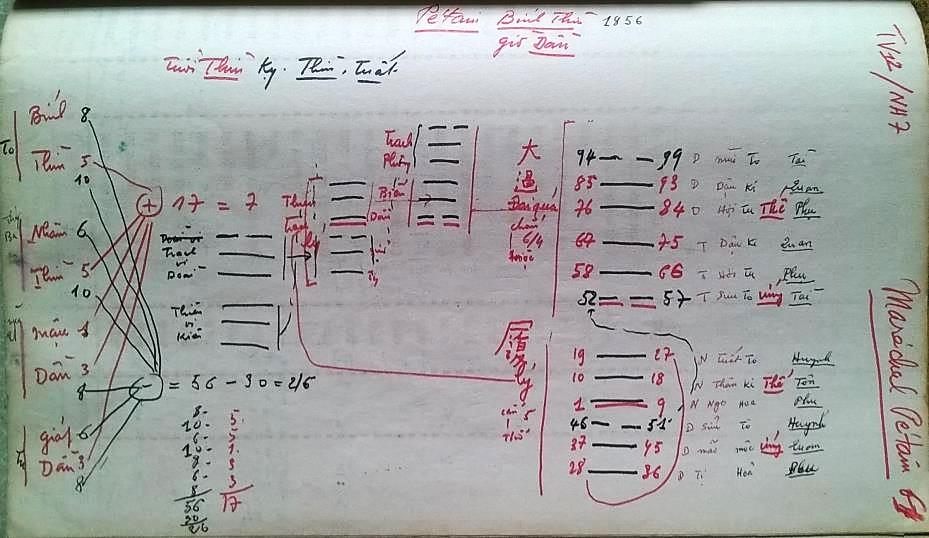 HLPetain